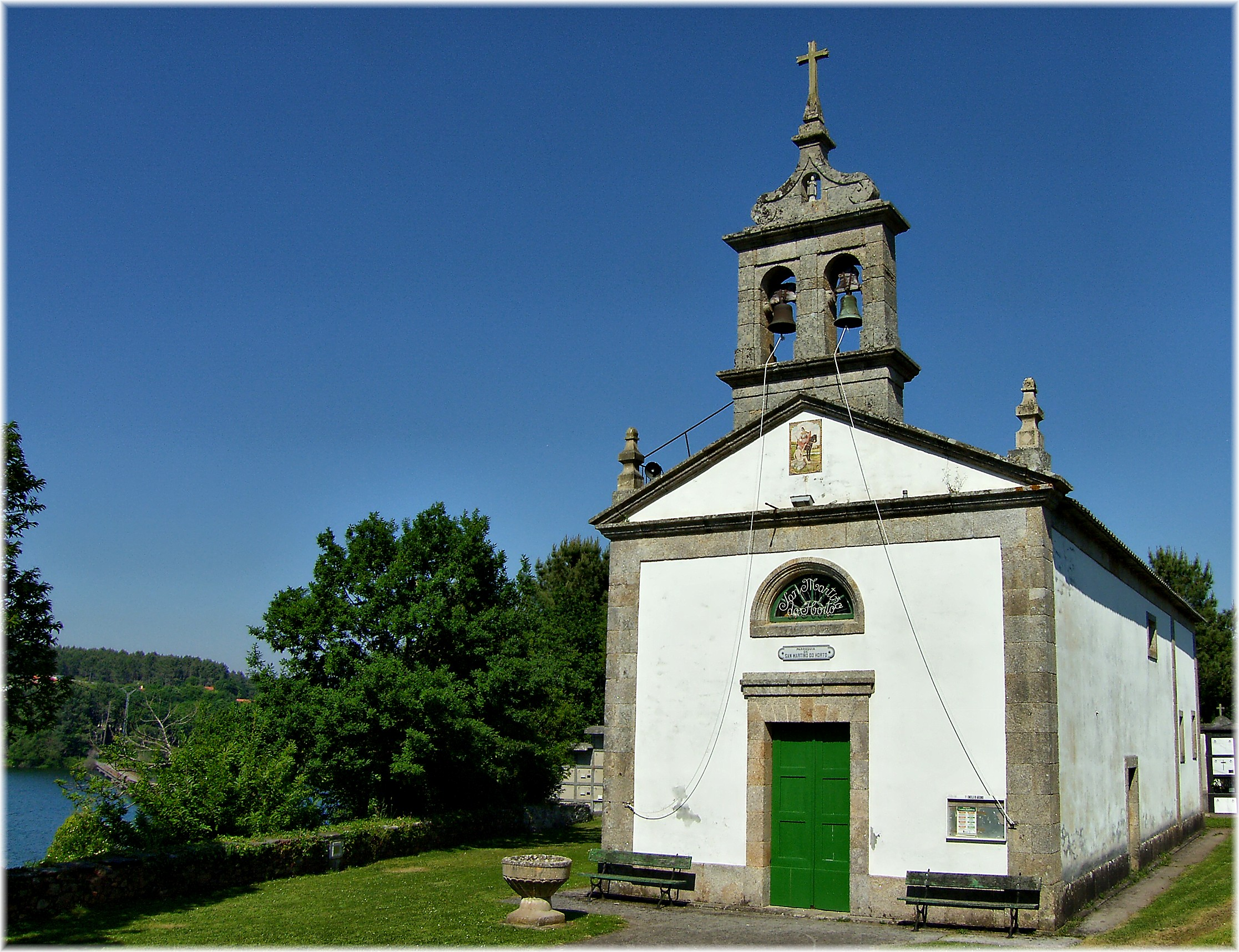 San Martiño do Orto, Abegondo (Galiza)